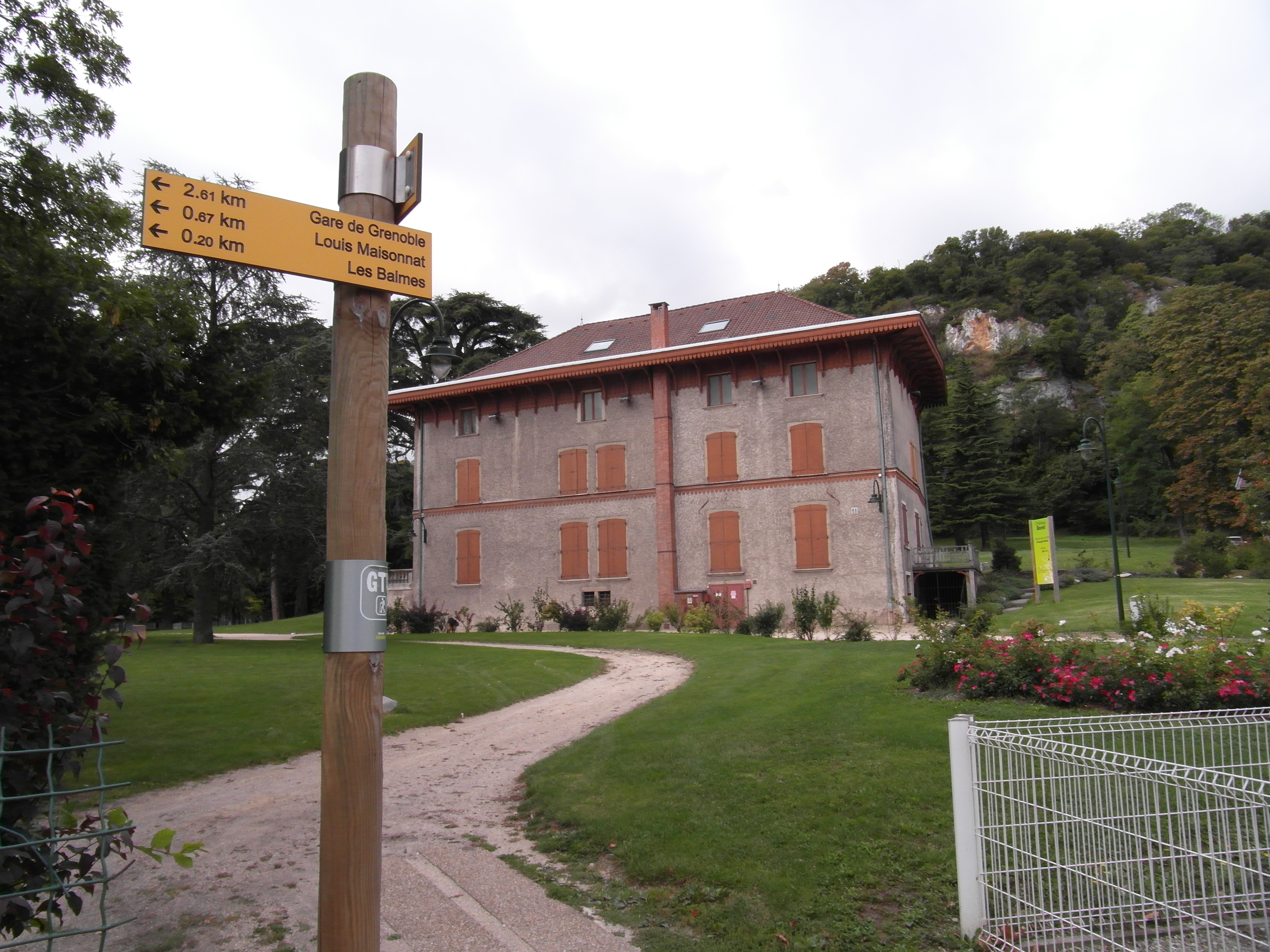 Chateau de la balme